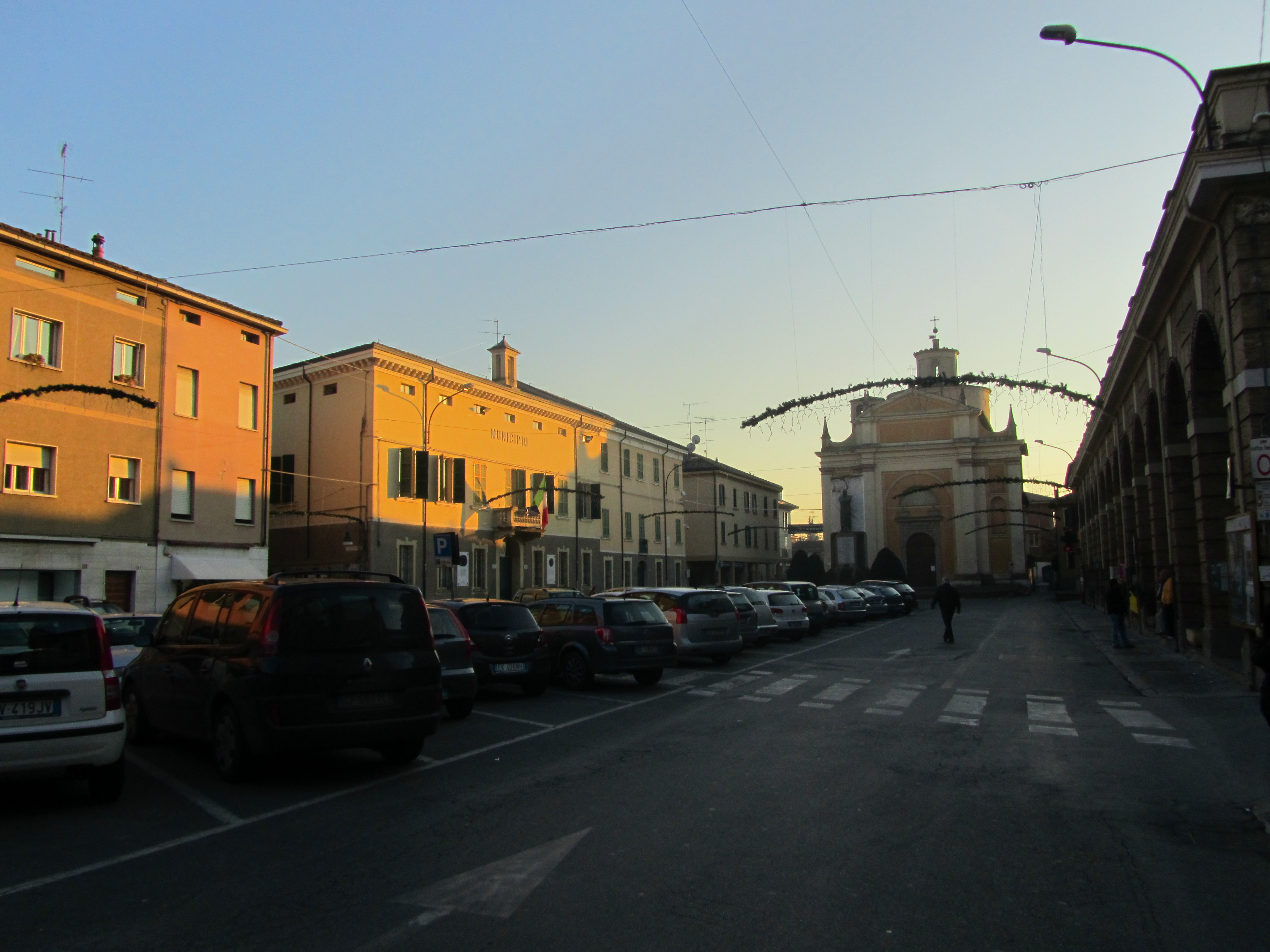 Piazza della Repubblica a Montecchio Emilia, provincia di Reggio nell'Emilia.